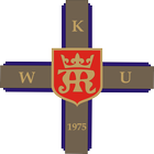 logo wku jaslo